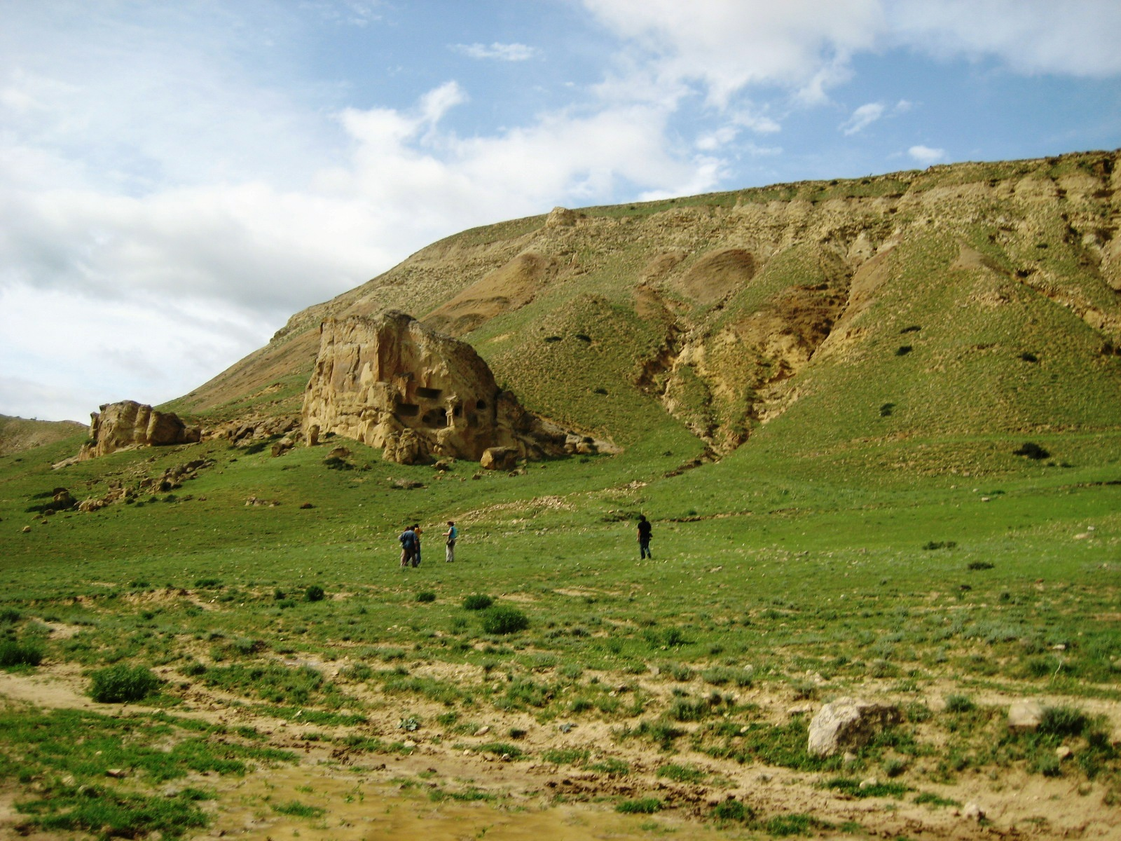 კასპის აკლდამები